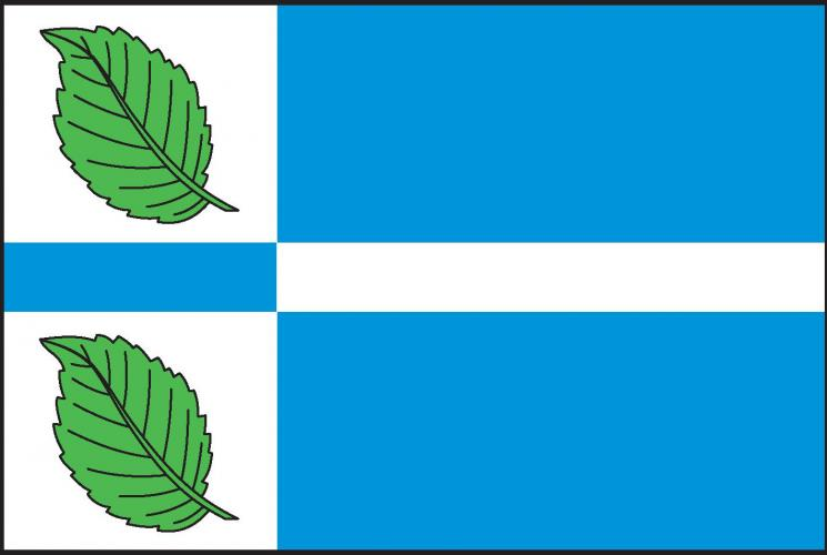 Bříšťany vlajka